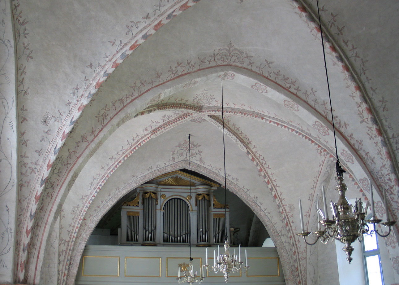 Ekebyborna kyrka.Orgeln.